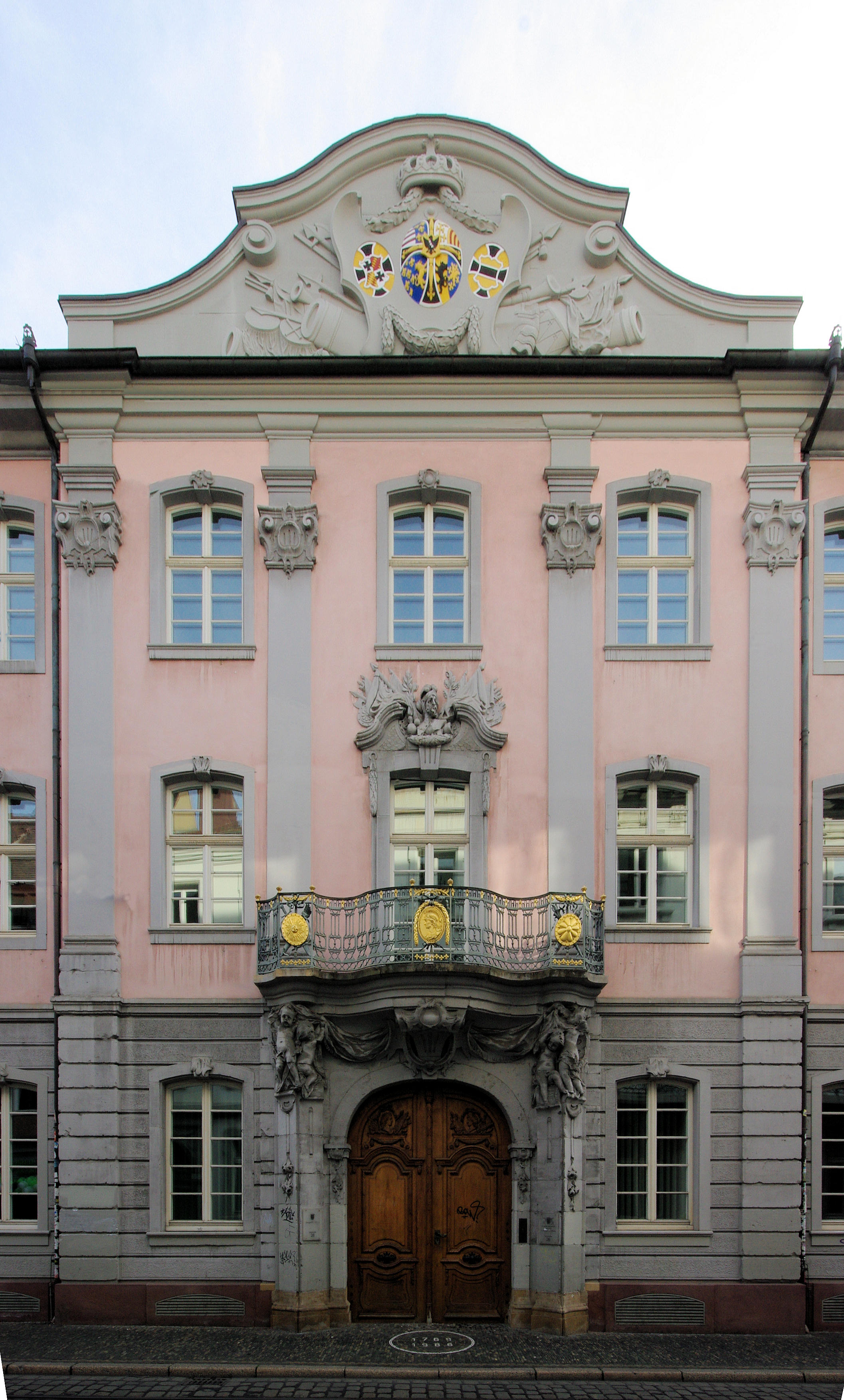 Ehemalige Deutschordenskommemde in Freiburg, Sitz der Zivilsenate des OLG Karlsruhe Außenstelle Freiburg und des Landgerichts Freiburg